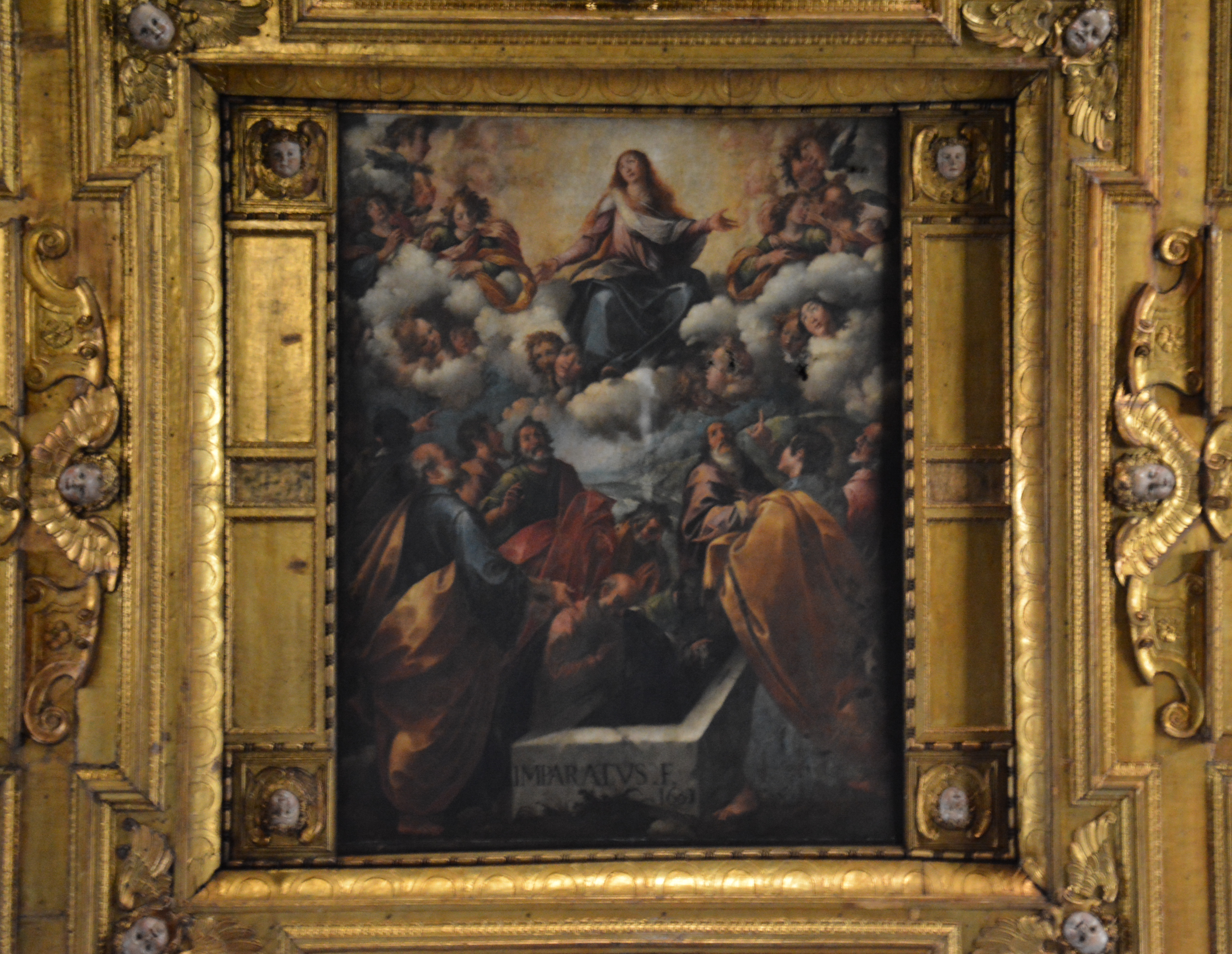 Soffitto della chiesa di Santa Maria la Nova a Napoli